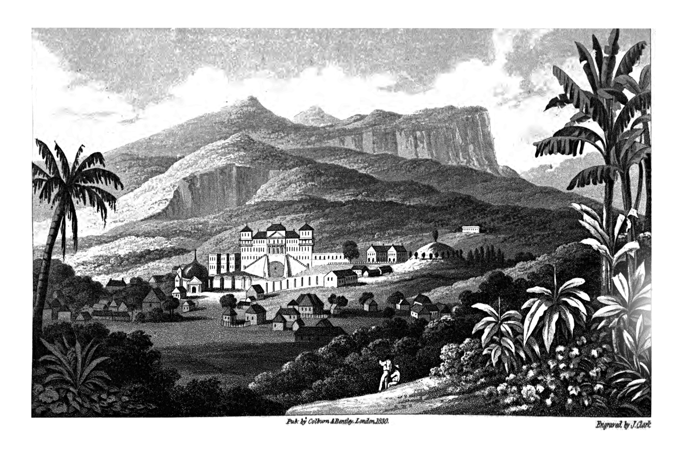 Le Palais Sans-Souci à Milot en Haïti, 1830